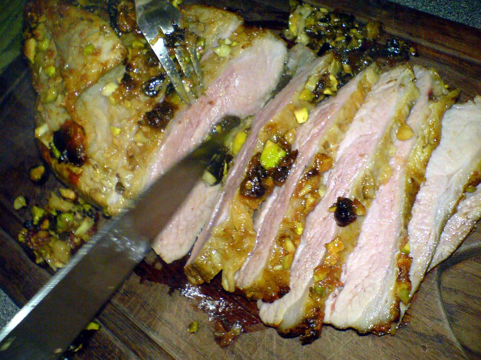 Kalvecuvette farseret med pistacienødder, svesker, hvidløg og ingefær